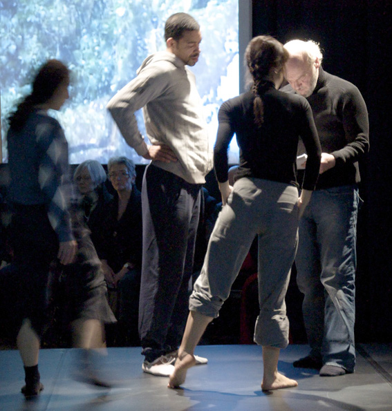 Choreografie van vele dansfims